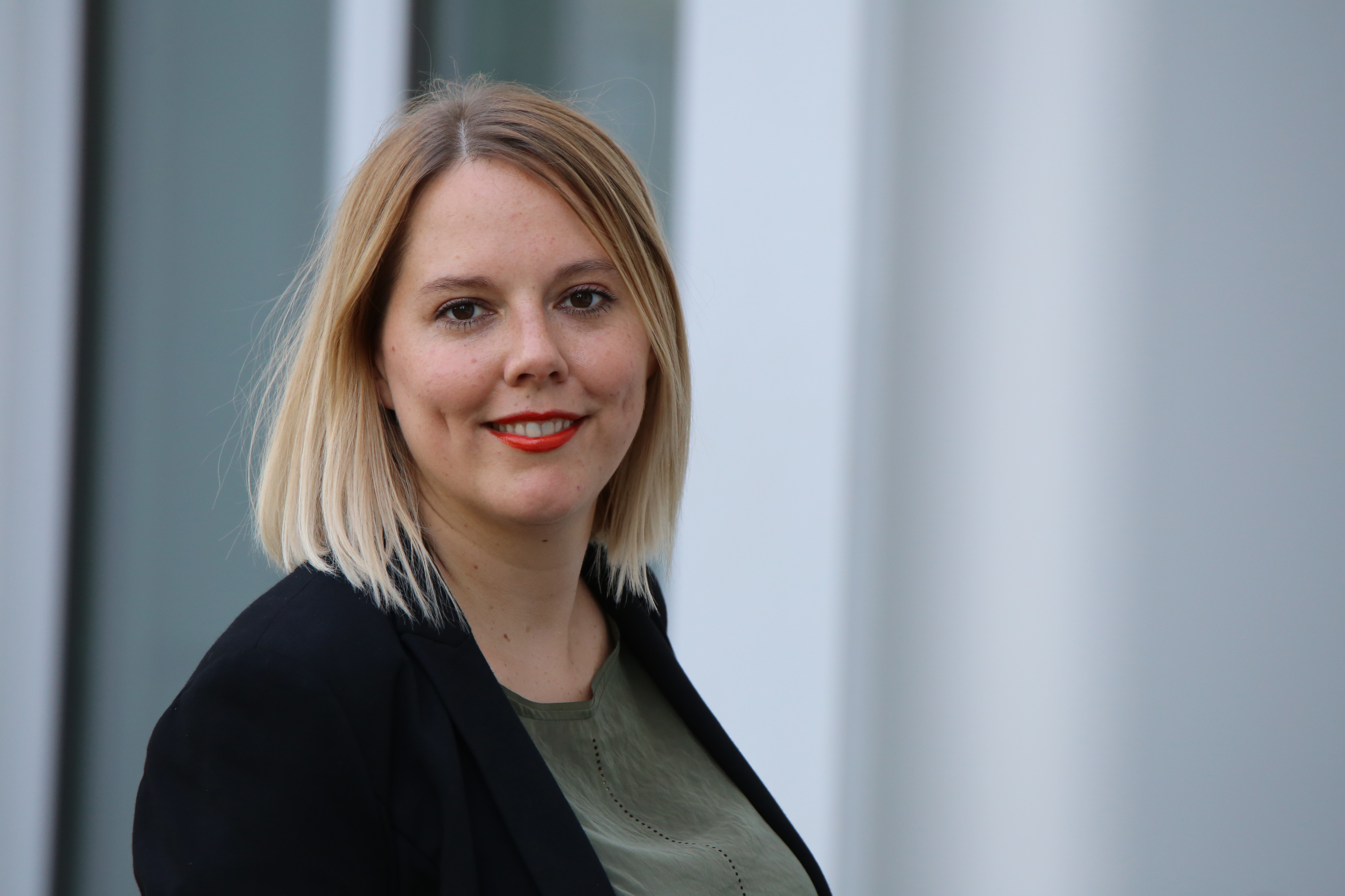 Franziska Müller-Rech in Düsseldorf am 23.07.2020